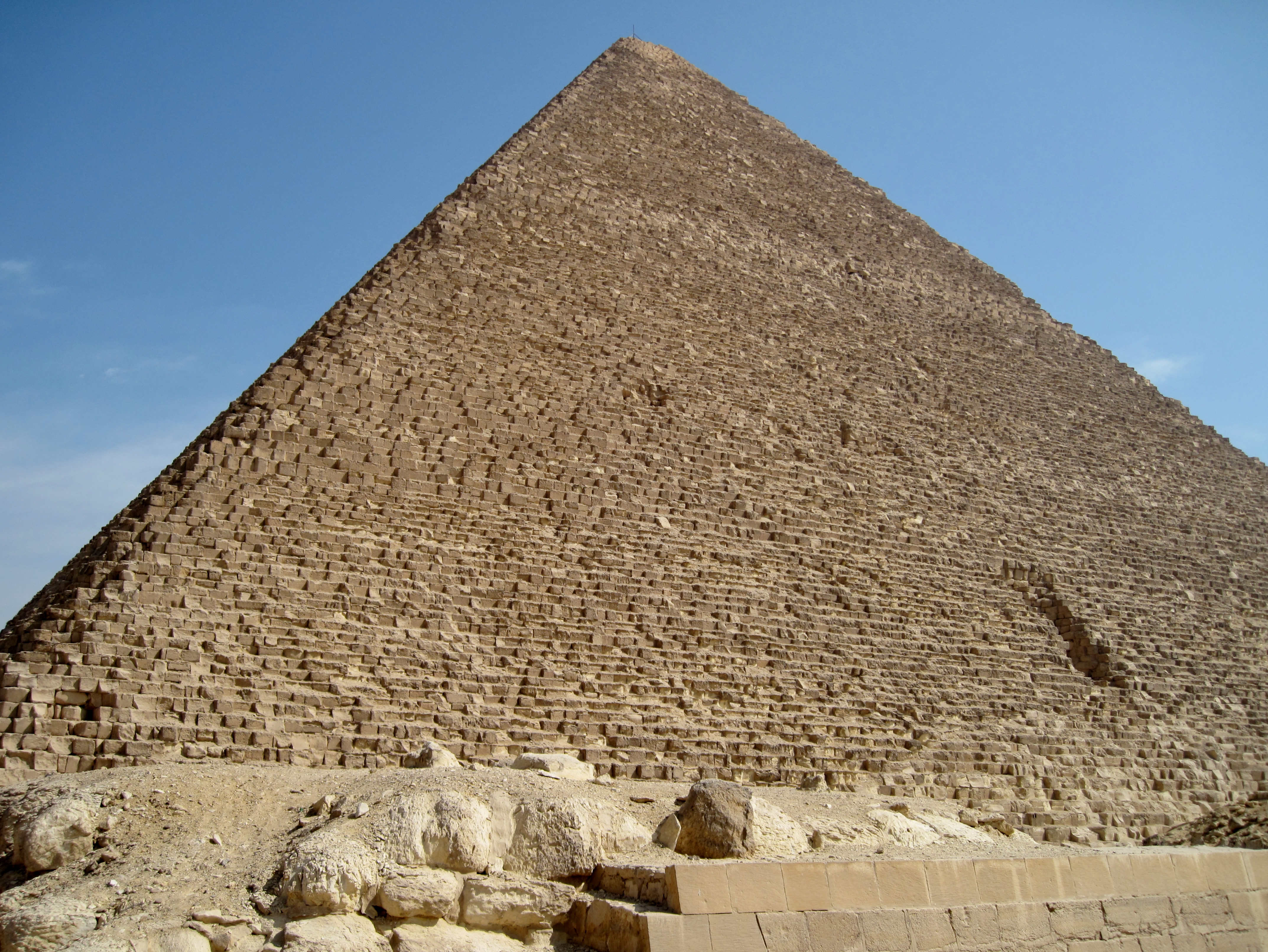 Südwestseite der Cheops-Pyramide auf dem Giseh-Plateau bei Kairo, Ägypten